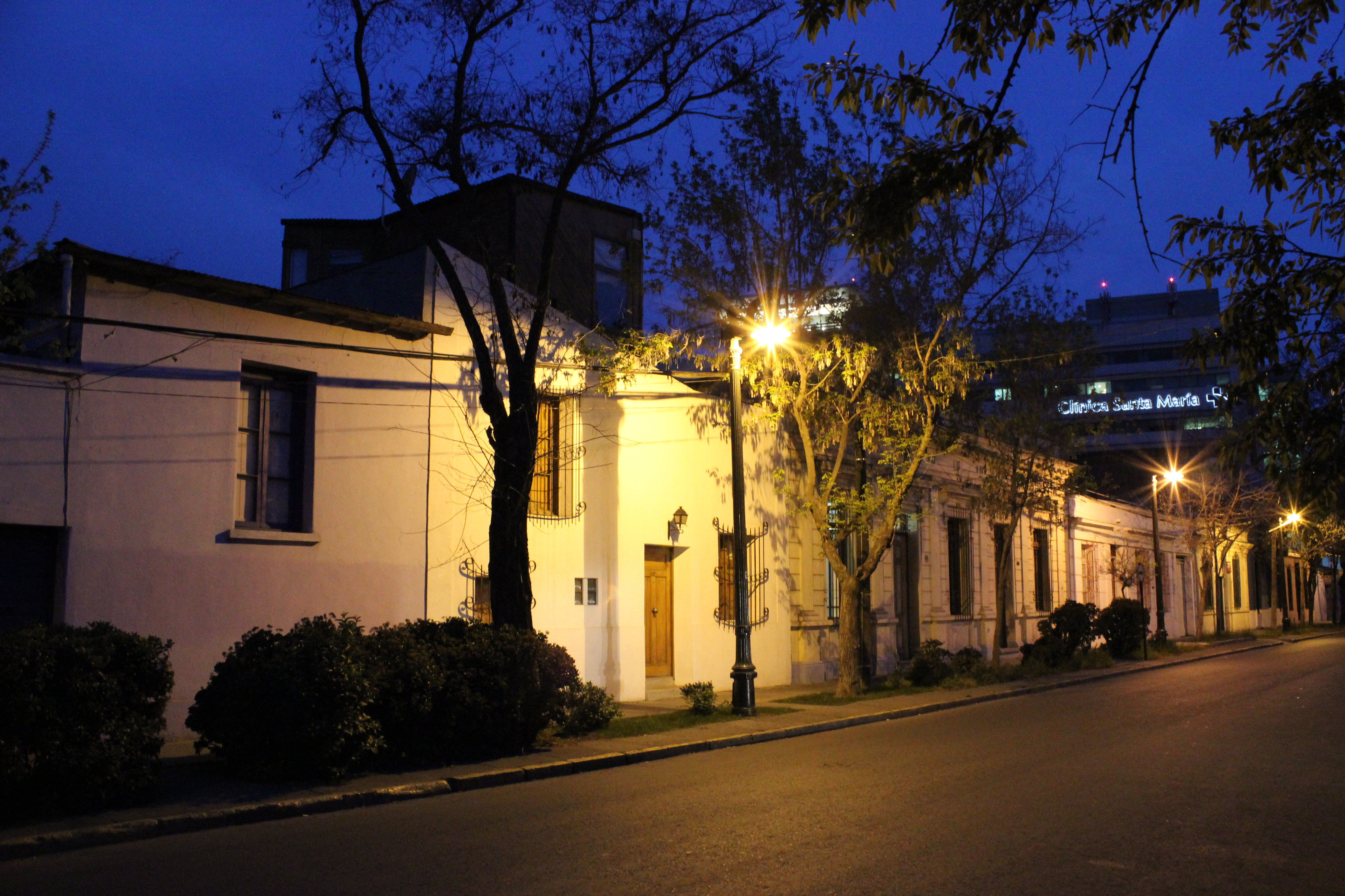 Calle Capellán Abarzúa This is a photo of a national monument in Chile: 246